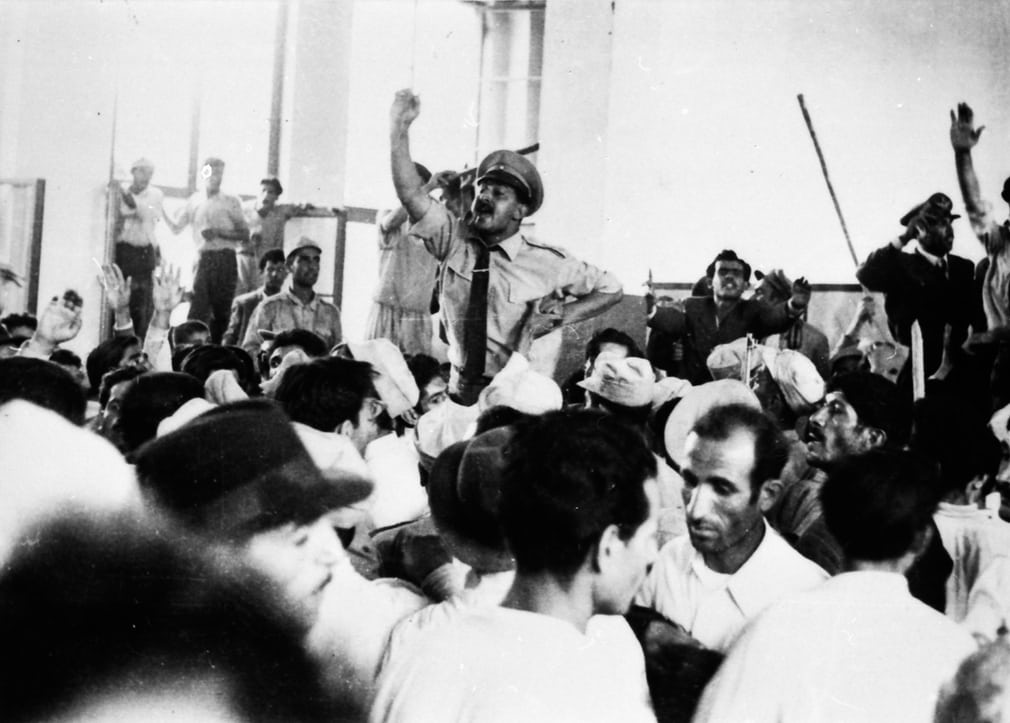 28 مرداد 1332، 1:30 ظهر: اشغال ساختمان رادیو تهران